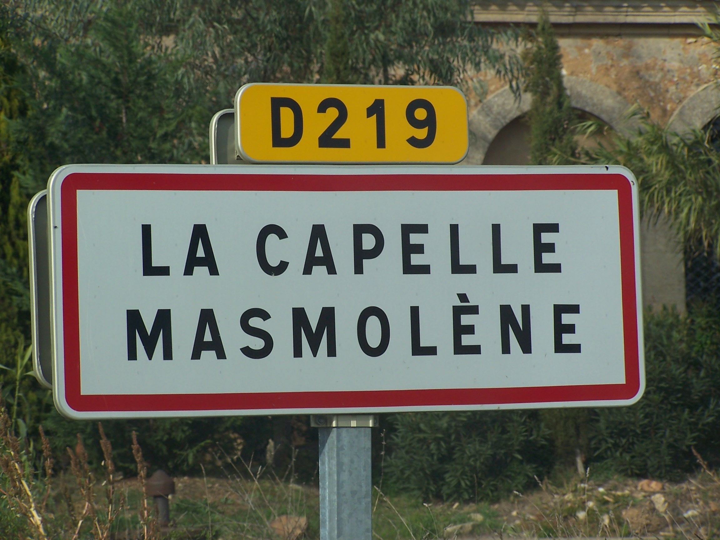 Panneau routier : La Capelle-Masmolène / Roadsign la Capelle-Masmolène